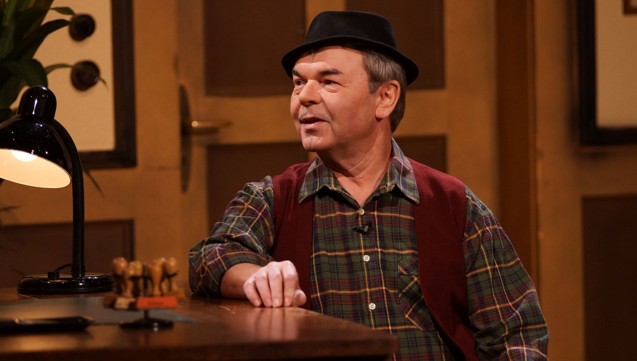 Der Hannes gespielt von Albin Braig